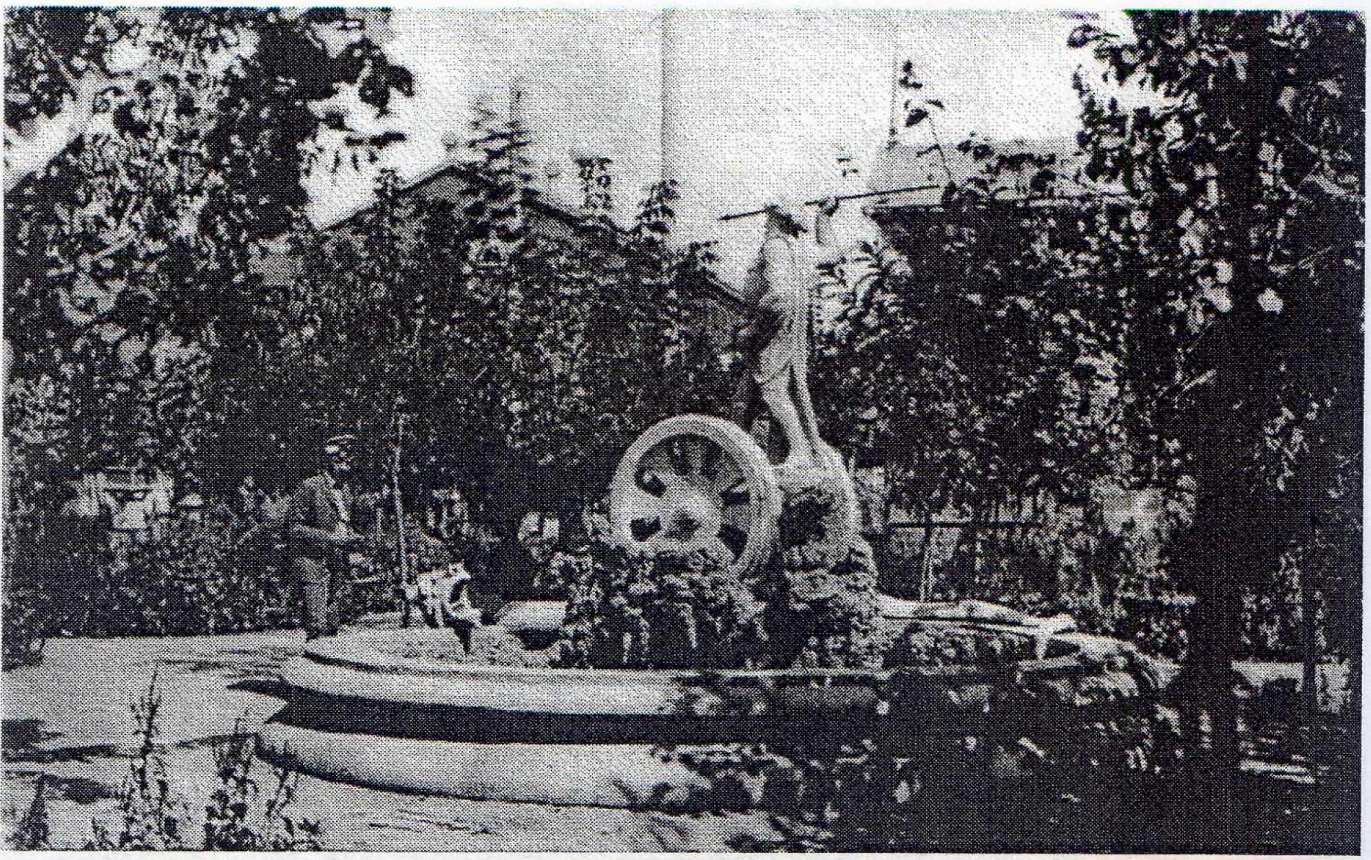 Ростов на Дону Фонтан в саду Буфф